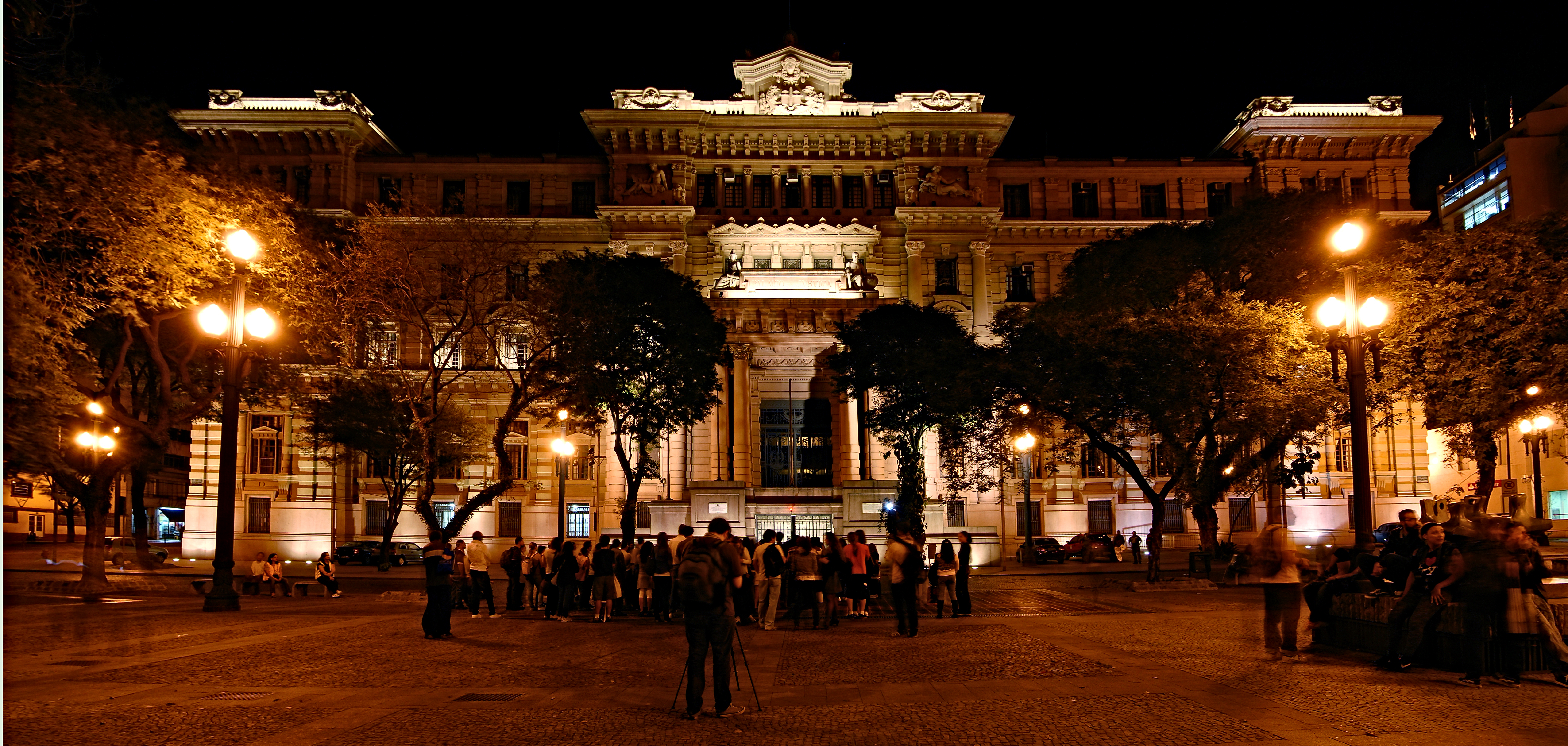 Caminhada Noturna no Centro Promovida e patrocinada pelo Restaurante Vegetariano Apfel